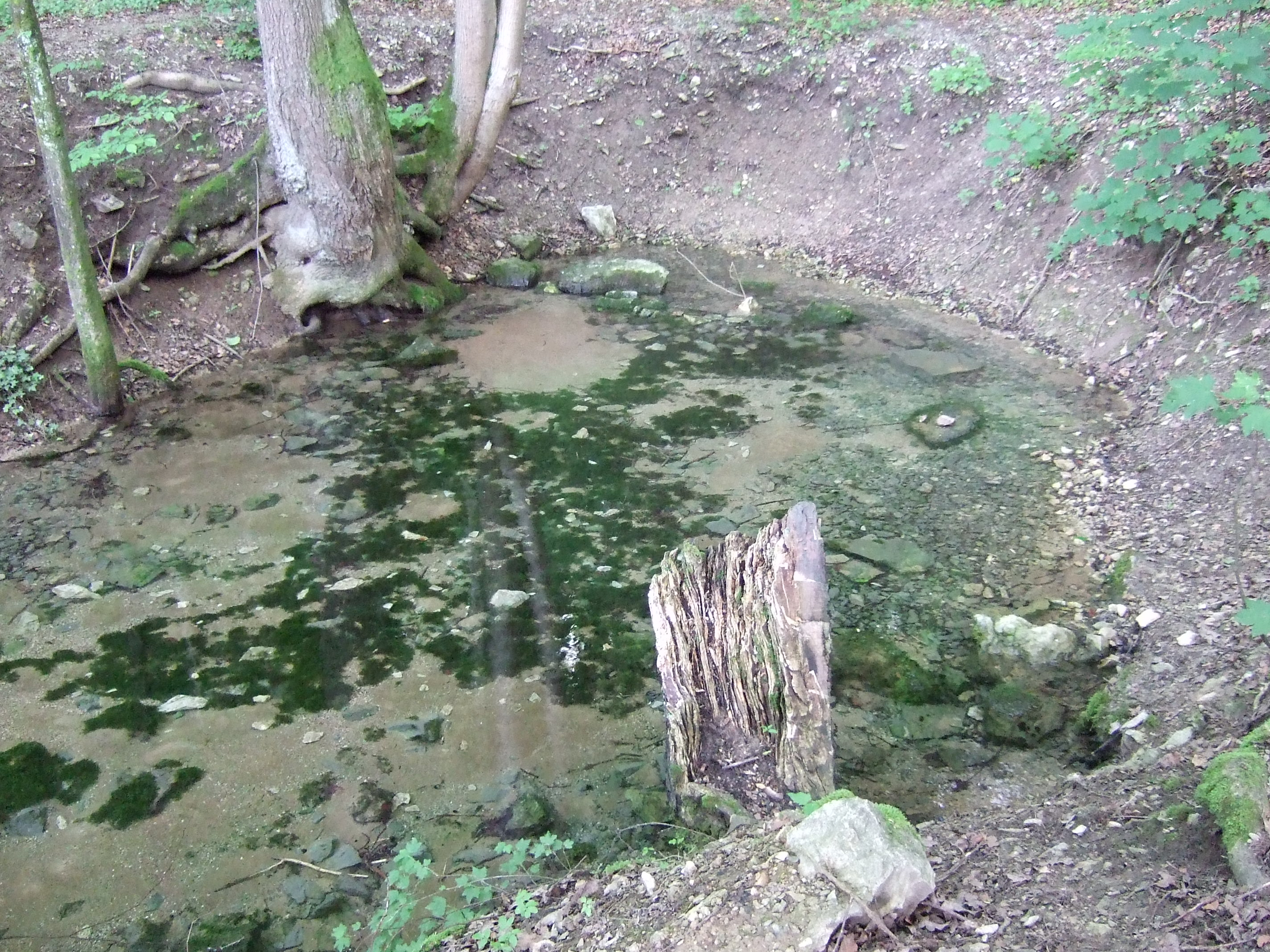 Die Friesenquelle (400l/s) bei Kasendorf